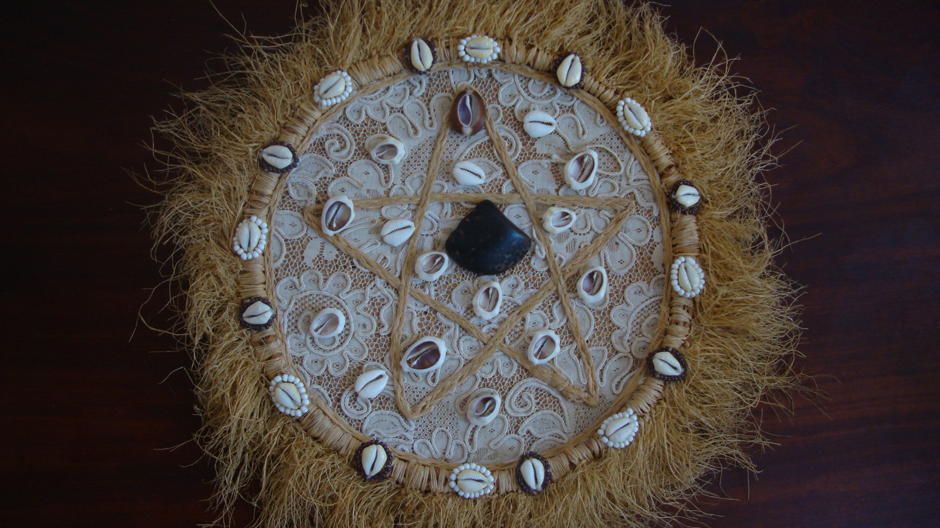 Odu Irosun, Merindilogun, quatro búzios abertos, Candomblé, Salvador, Bahia, Brasil.